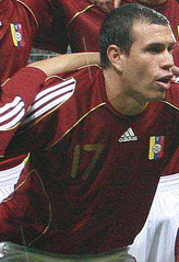 Jorge Alberto Rojas